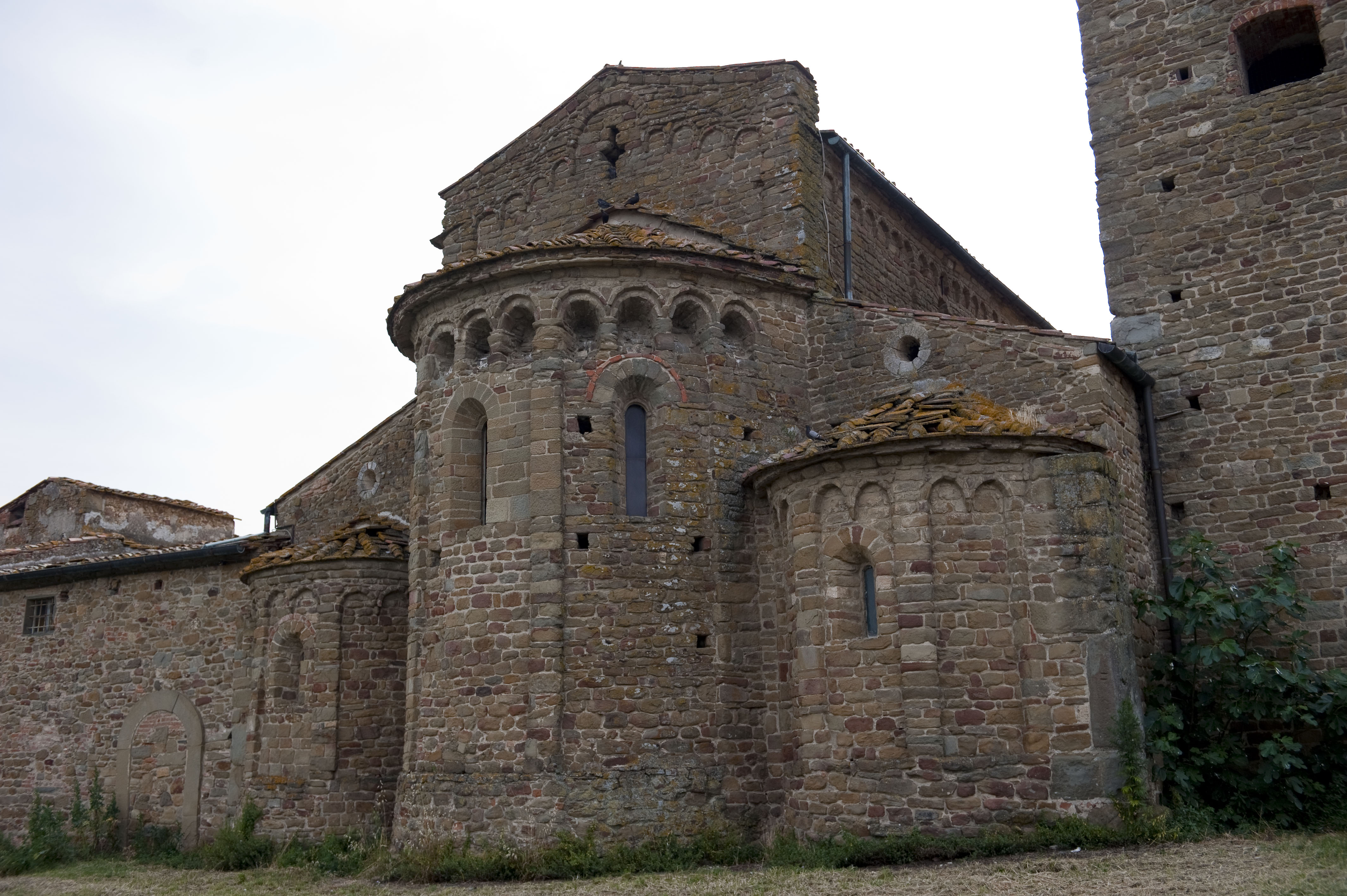 Abside della pieve di San Leonardo ad Artimino (Carmignano)